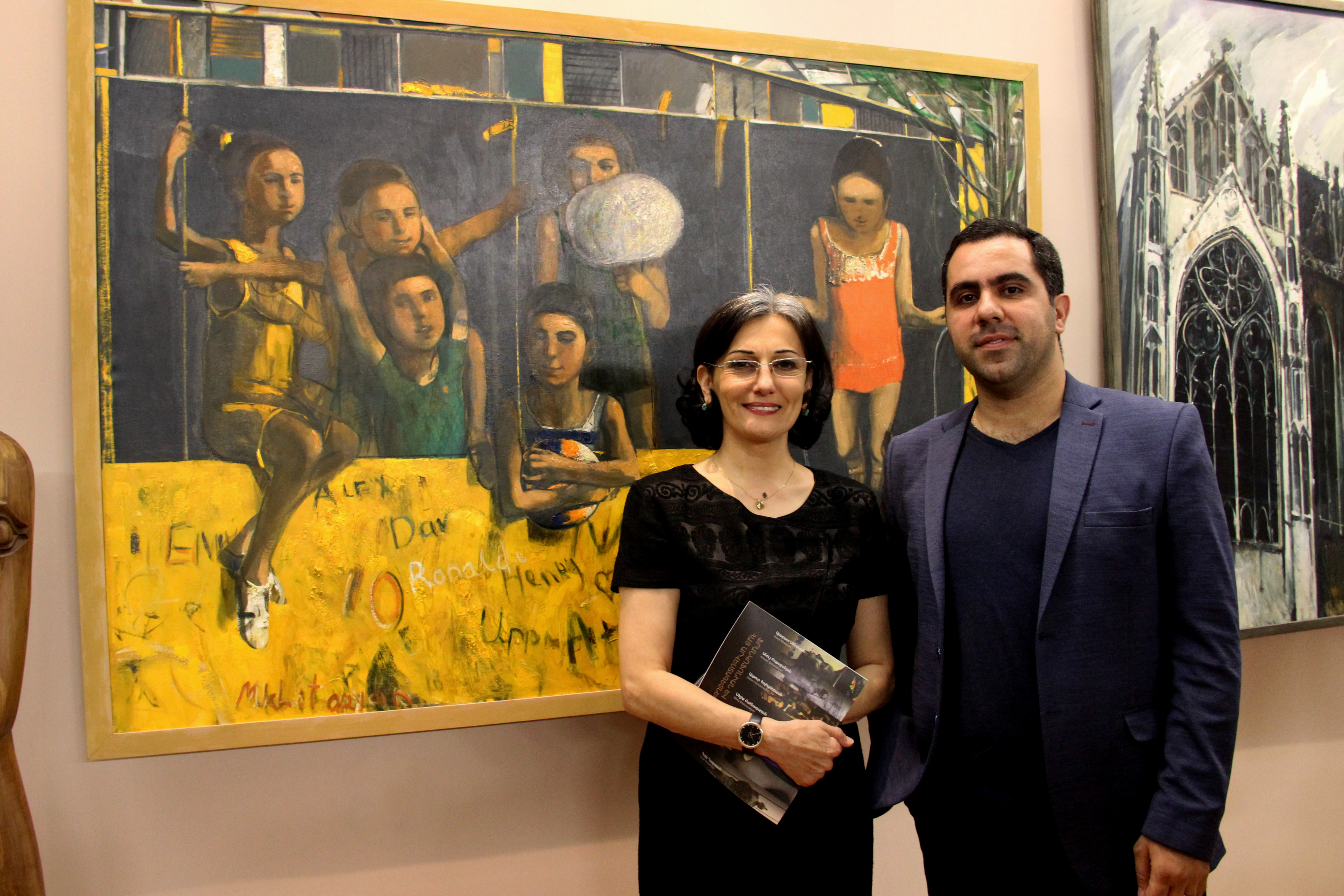 «Ֆրանկոֆոնիայի XVII երևանյան գագաթնաժողովի» օրերին անցկացված «Ֆրանկոֆոնիան և հայ արվեստագետները» նախագիծը Հայաստանի պատմության թանգարանում: Նախագծի համադրող, գեղանկարիչ՝ Արթուր Հովհաննիսյան